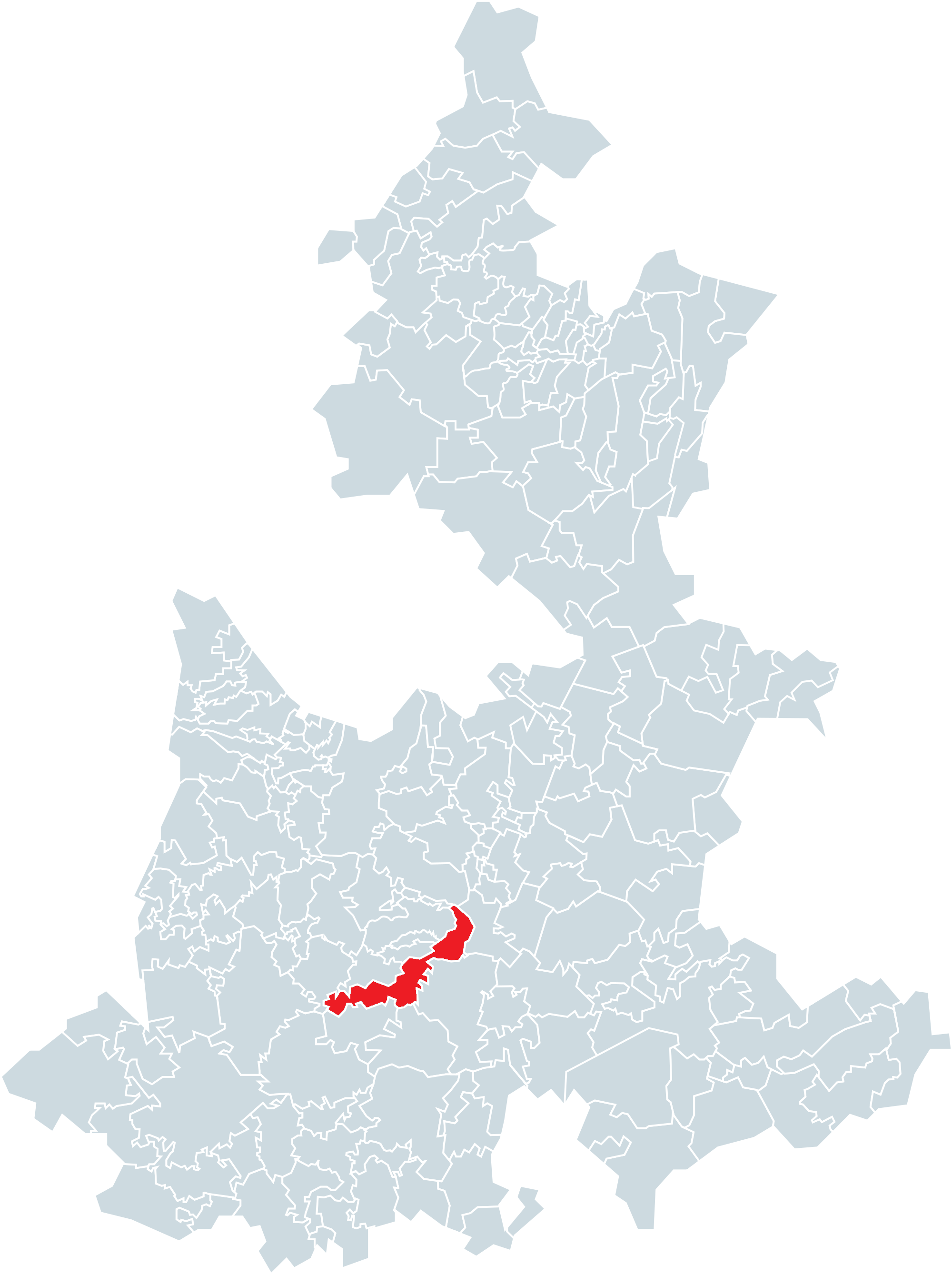 Municipio de Zacapala